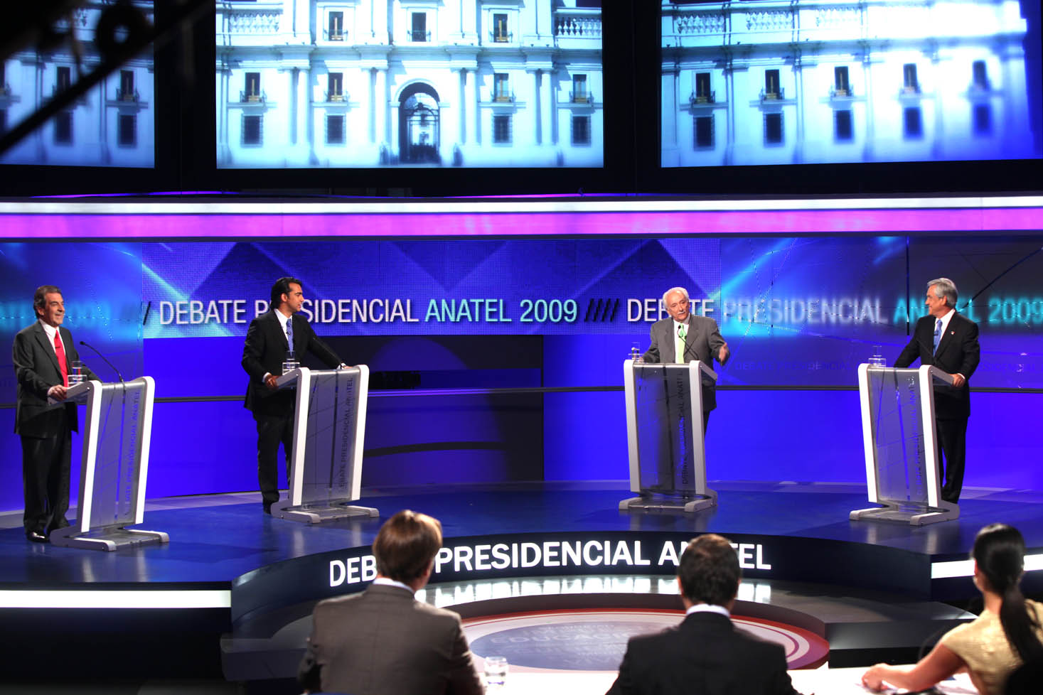 Los cuatro candidatos de las elecciones presidenciales de 2009 en Chile durante el debate organizado por ANATEL, el 16 de noviembre de 2009